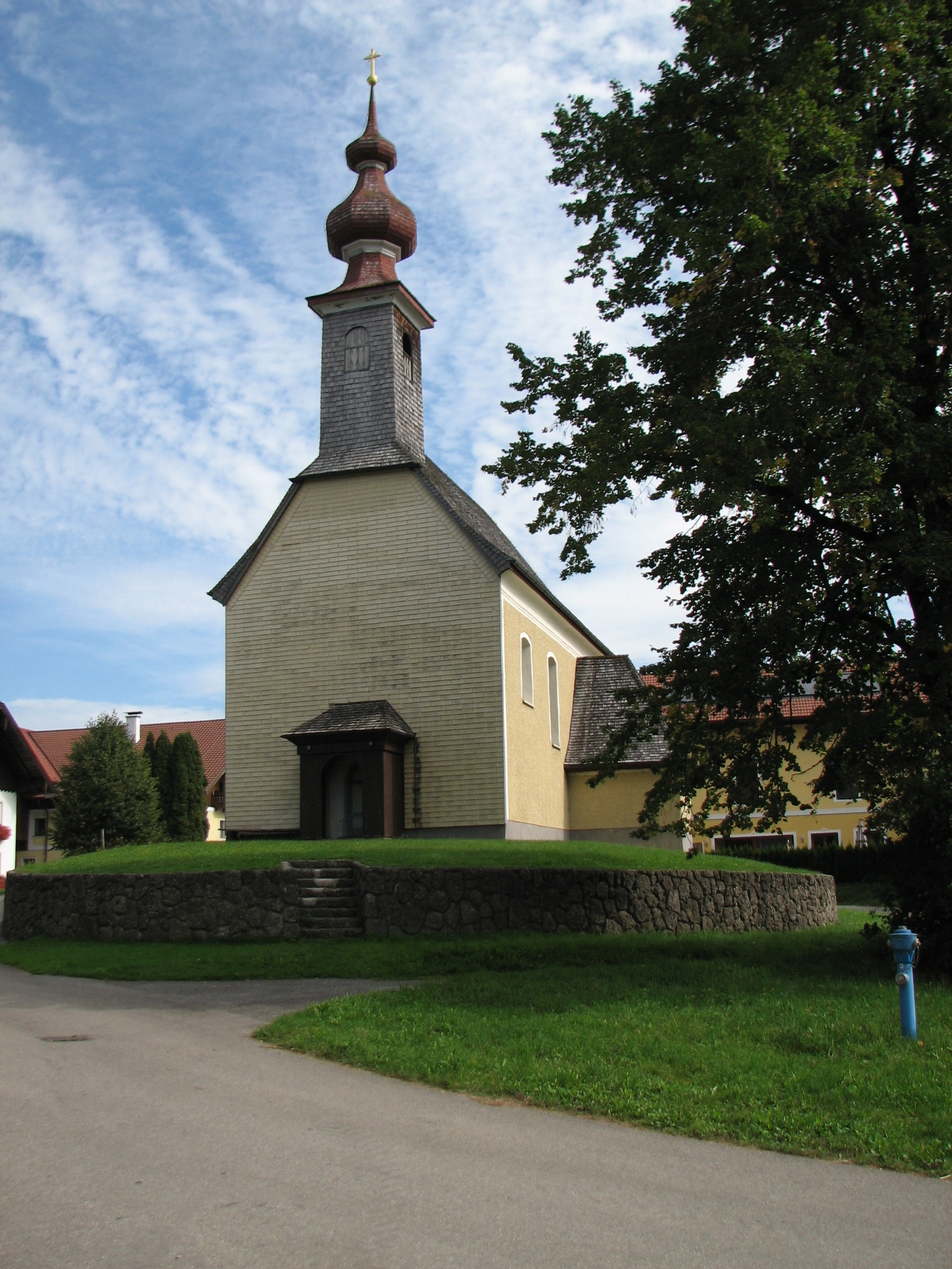 Kath. Filialkirche hl. Leonhard